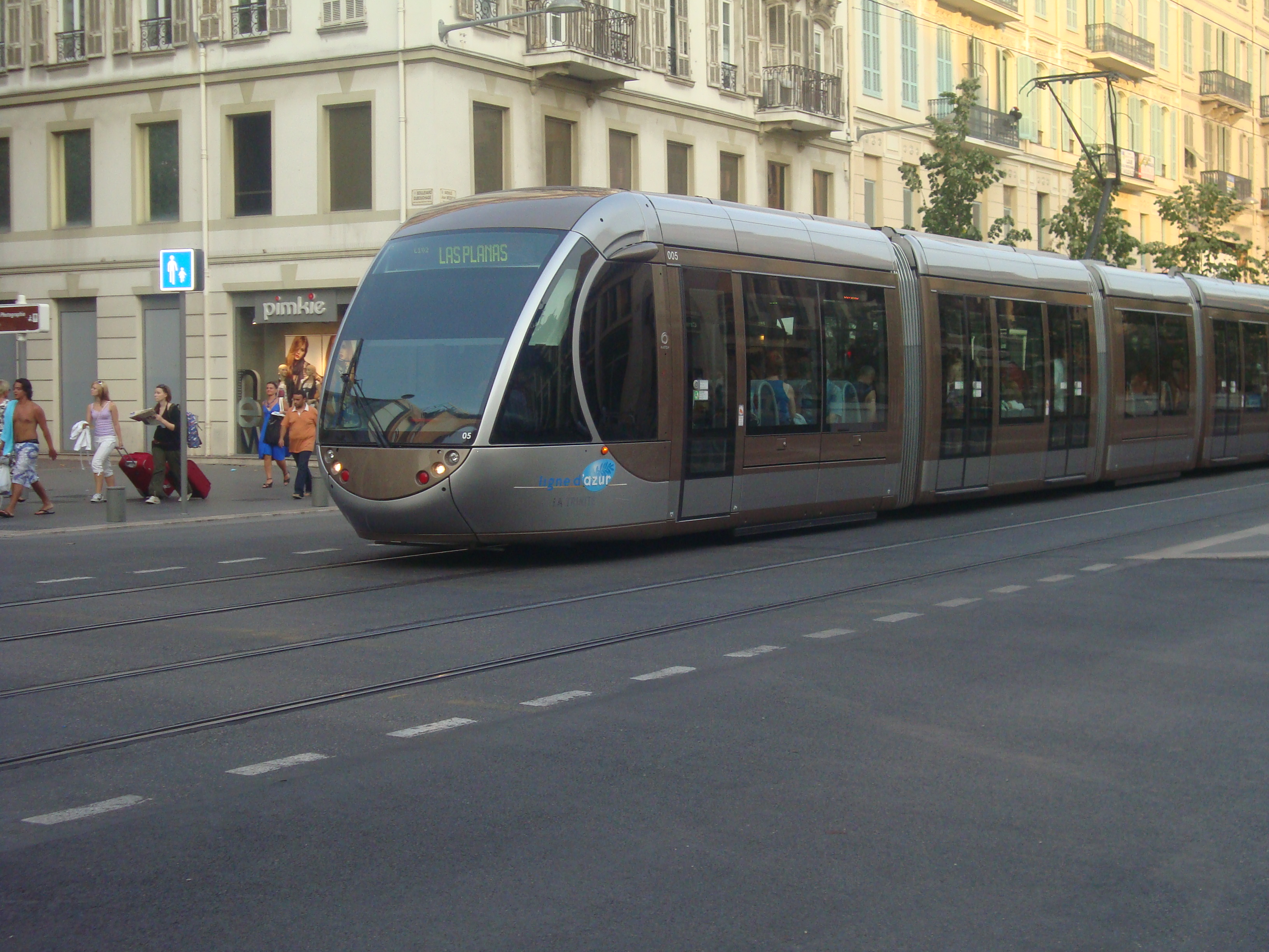 Citadis 302 n° 05 à Nice, livrée d'origine